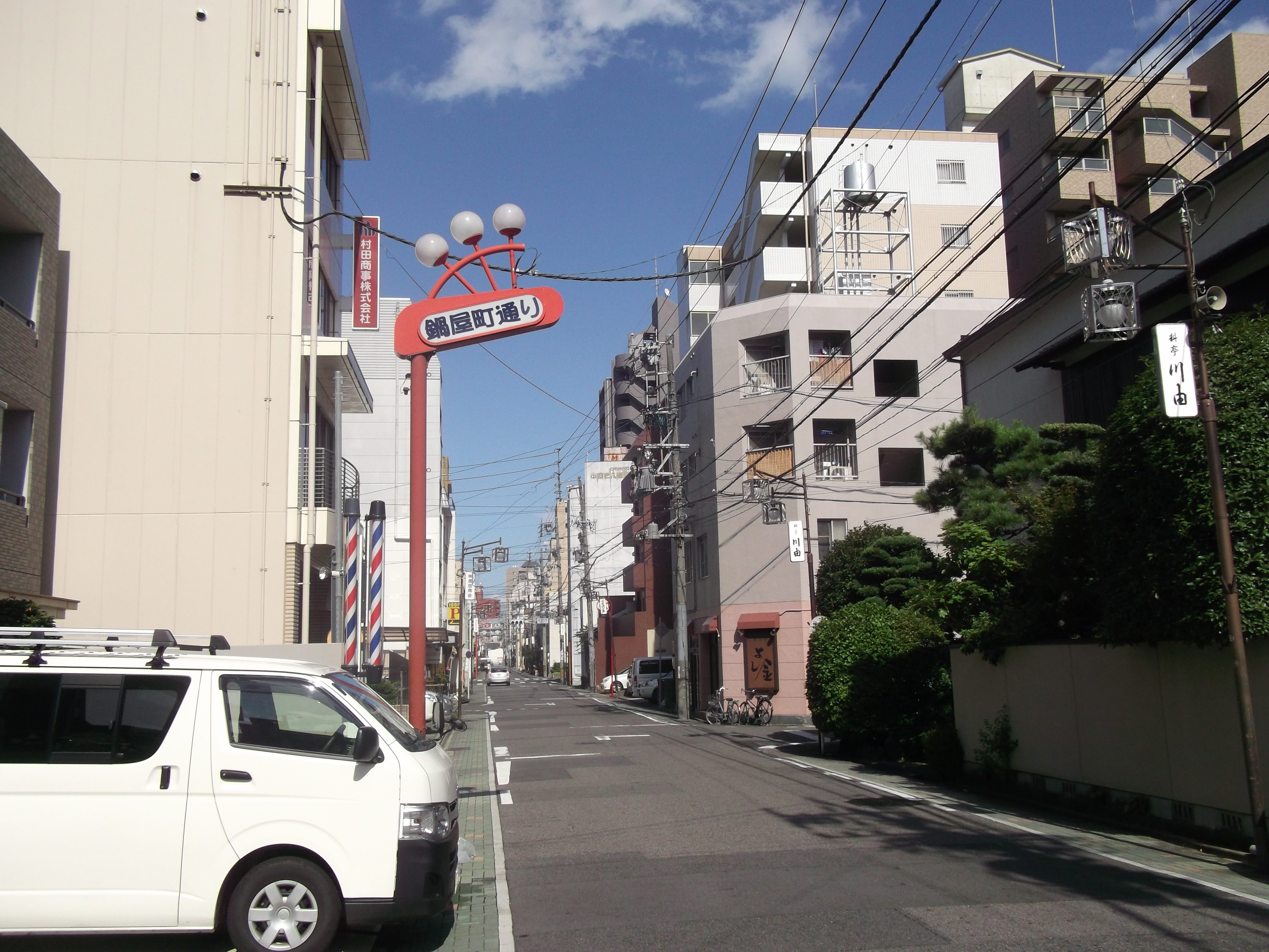 名古屋市東区の鍋屋町通を西側から東側に向けて撮影